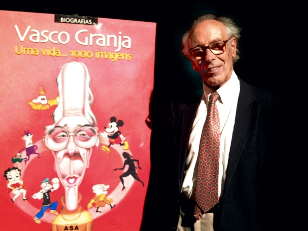 Vasco Granja na Exponor, Matosinhos, Portugal